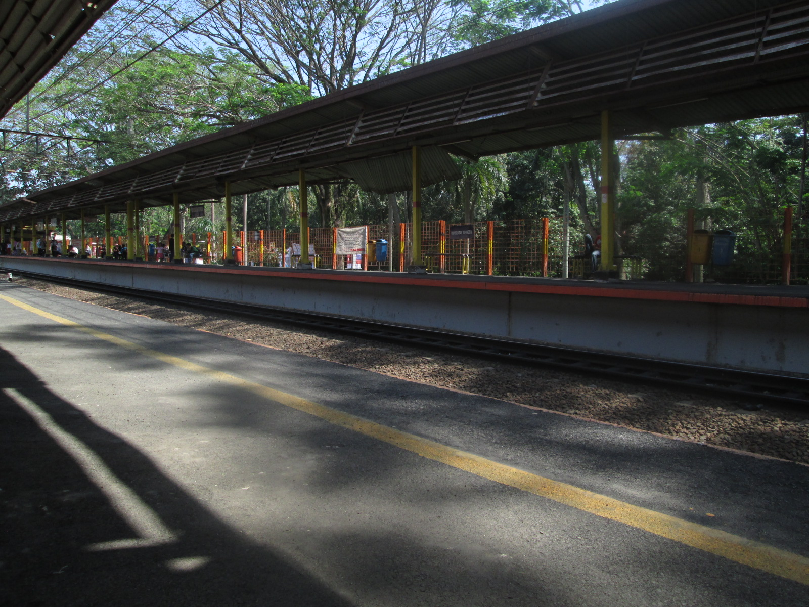 Stasiun Universitas Indonesia